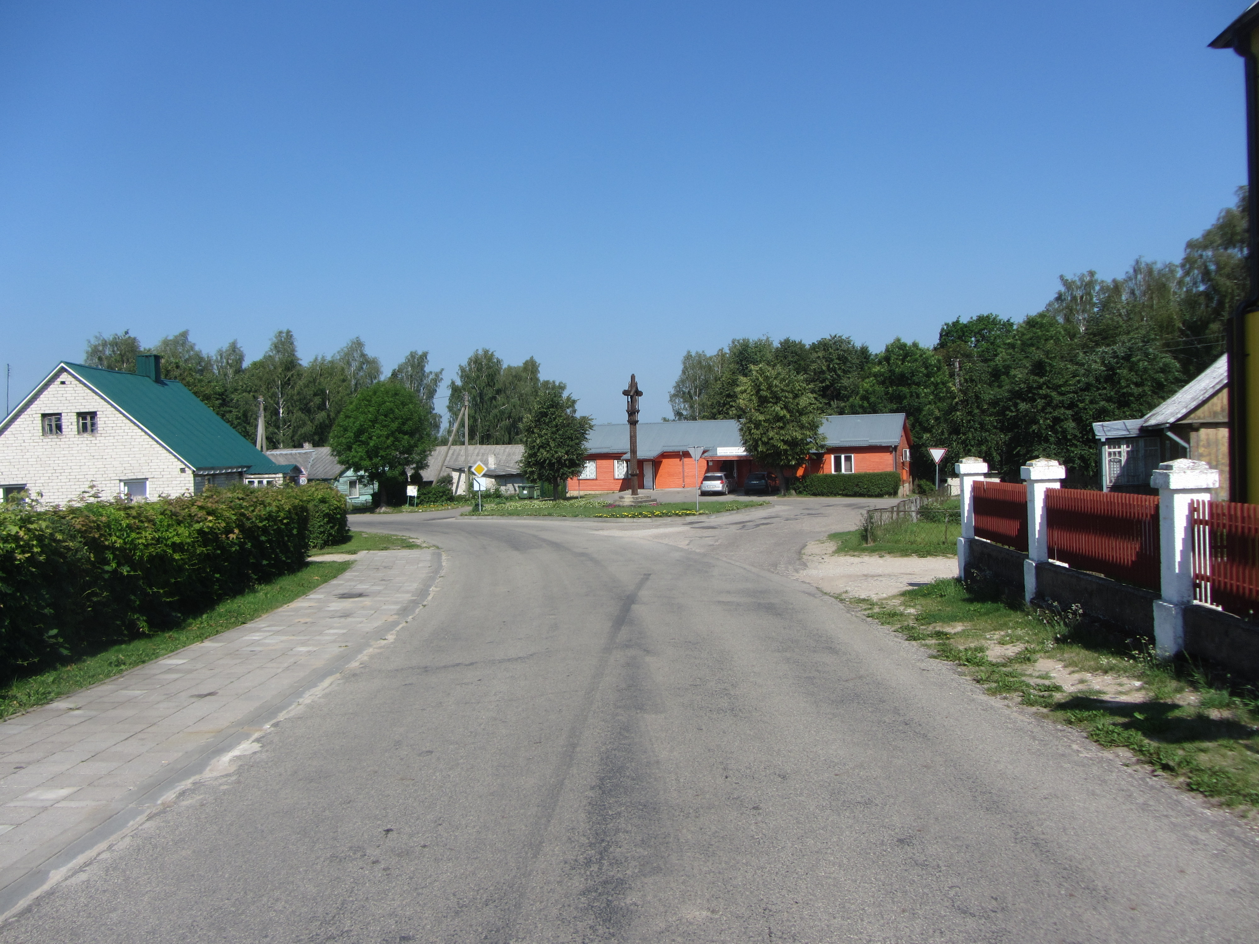 Šventežeris, Lithuania